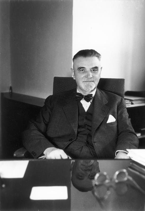 Dr. Hans Lukascheck Bundesminister für Angelegenheiten der Vertriebenen, 1949-1953 Foto Bundesbildstelle Bonn